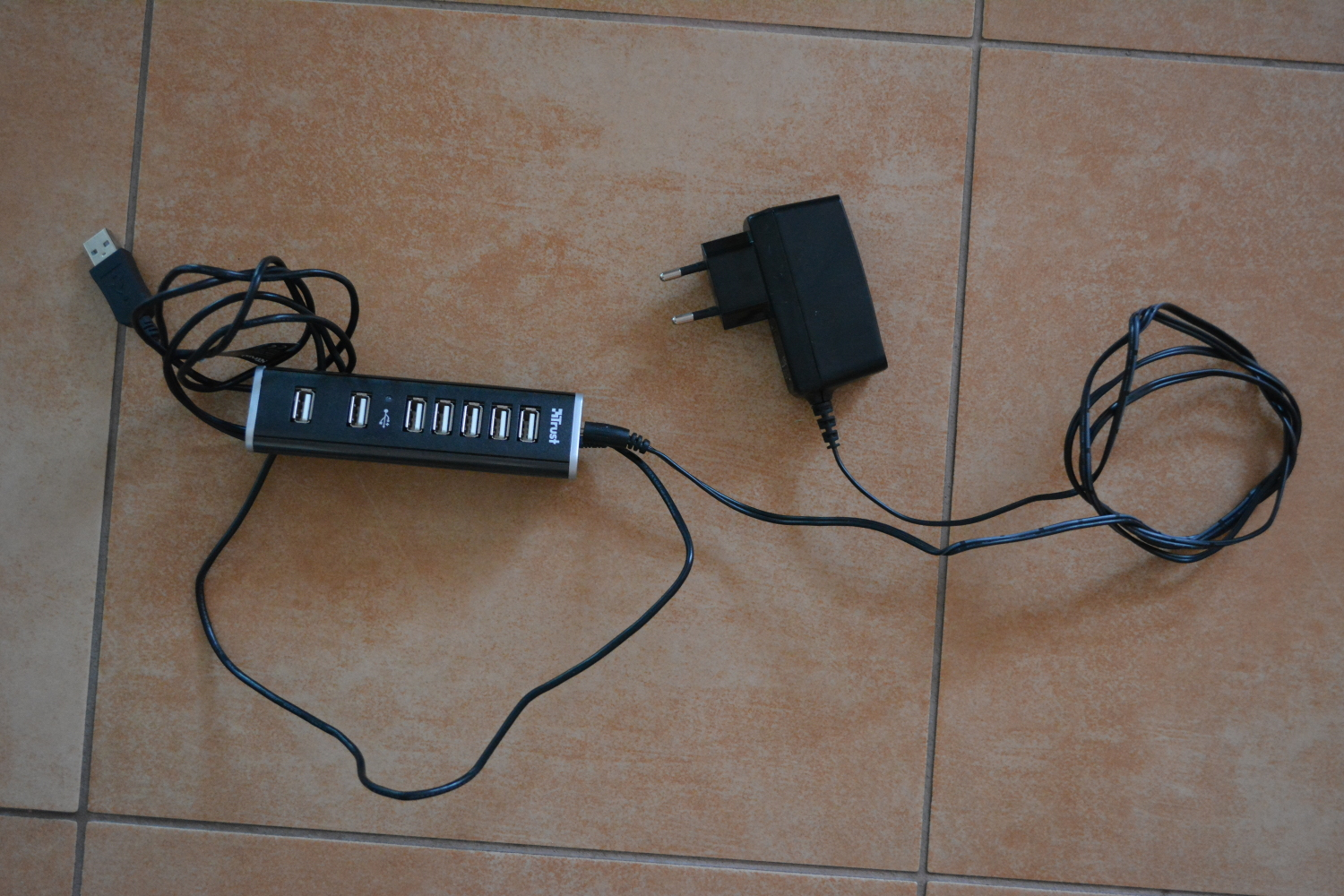 USB Hub 7 port